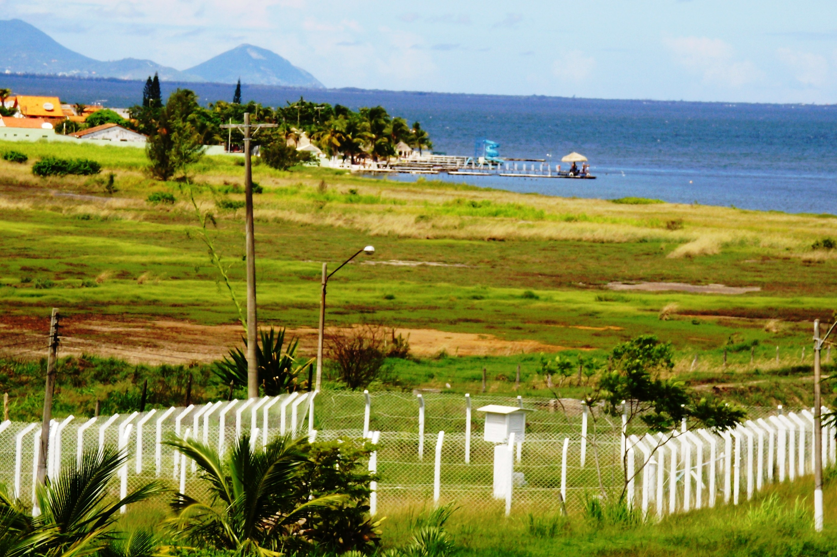 Estação meteorológica, Iguaba Grande, Rio de Janeiro, Brasil. Ao fundo, a lagoa de Araruama.